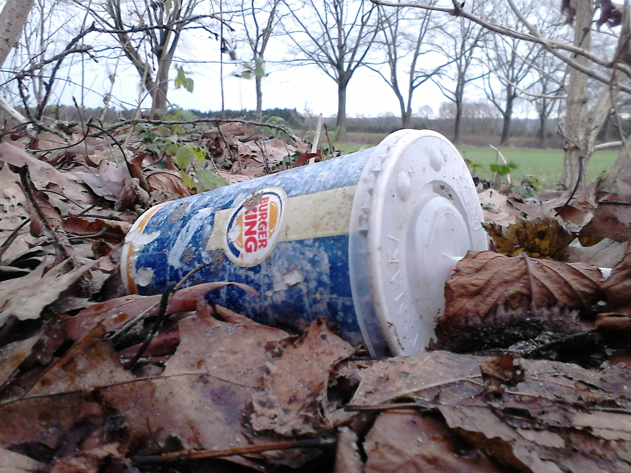 Fastfood Verpackung unsachgemäß entsorgt